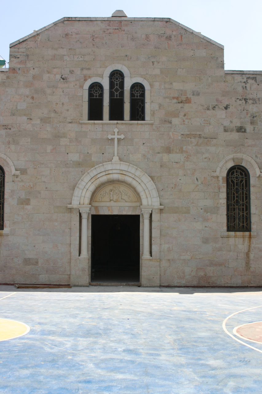 Kirche in Ramallah, Palästina. Object location31° 54′ 09″ N, 35° 11′ 55″ E